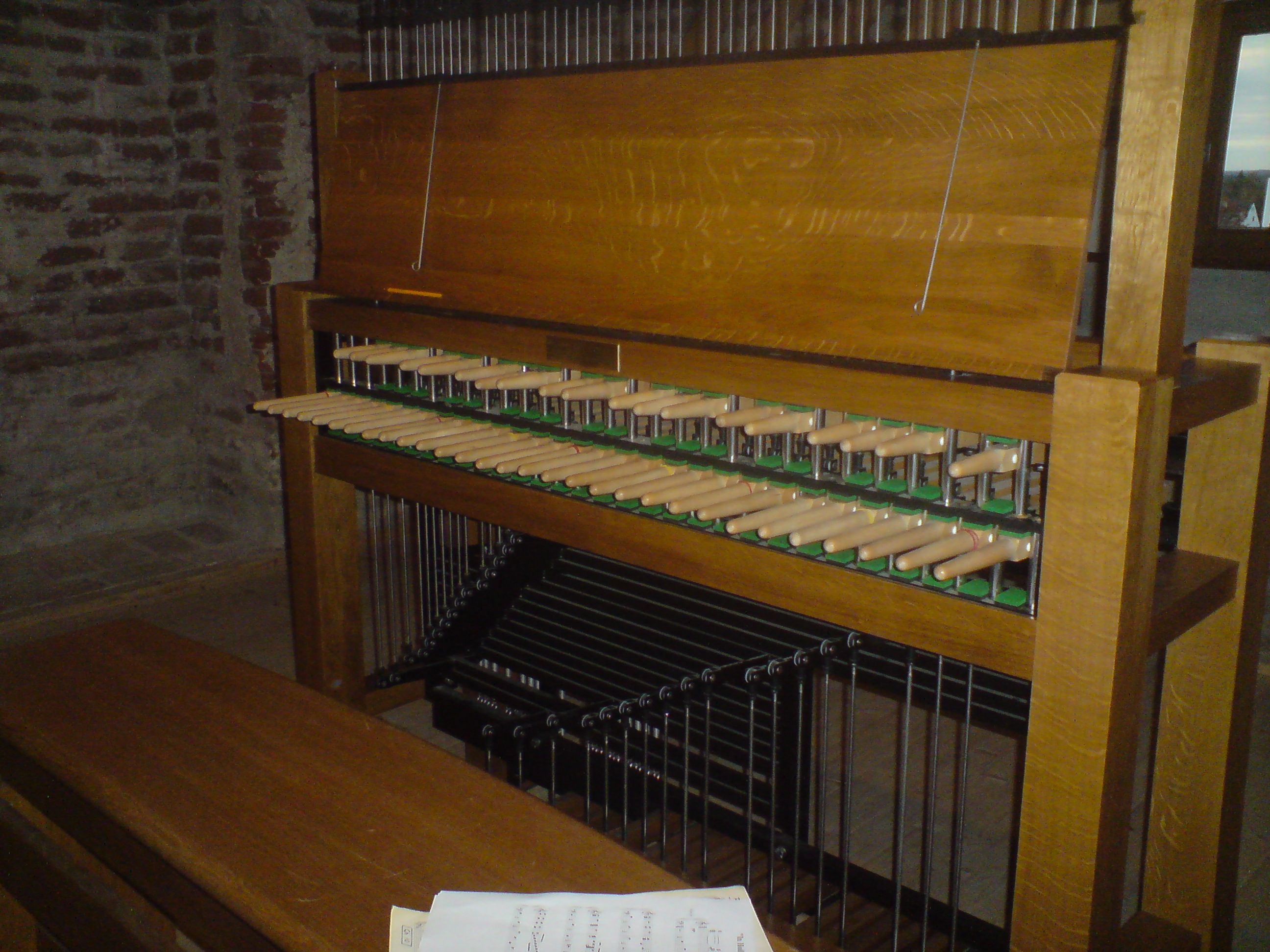 Spieltisch des Illertisser Carillons